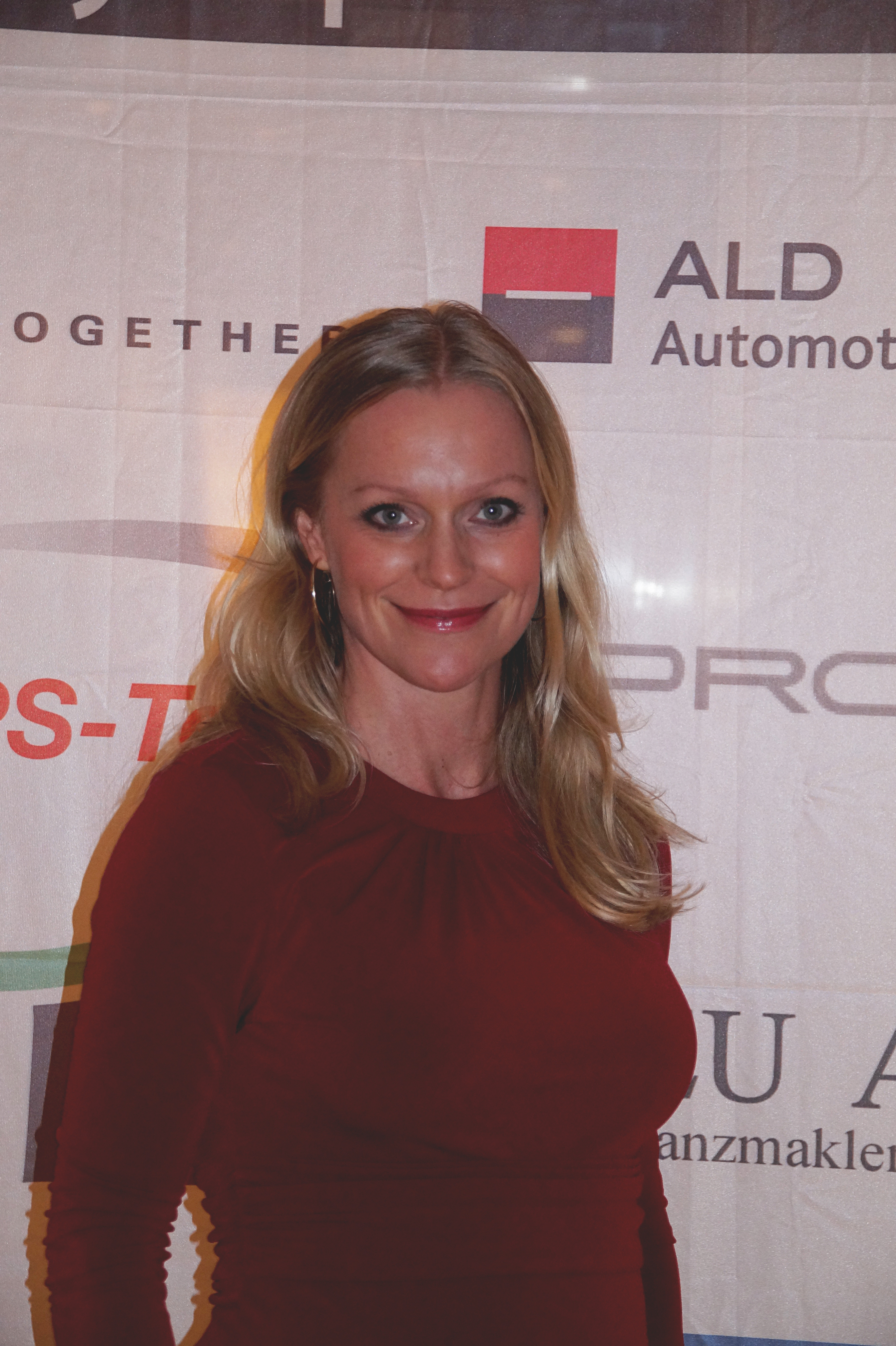 Valeska Homburg bei der "Kölner Charity Sports Night", am 27.11.2016 im Kölner Dorint Hotel.